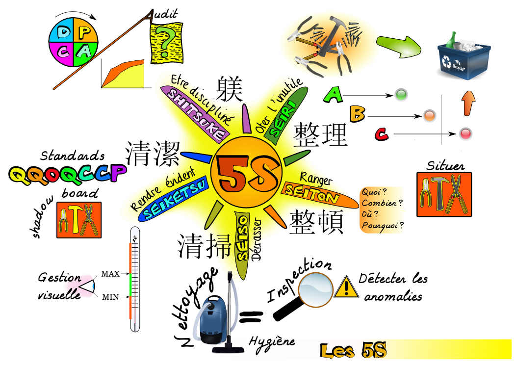 Carte 5S